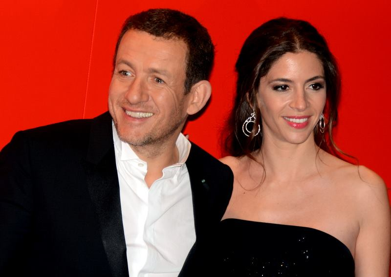 Dany et Yaël Boon à la cérémonie des César